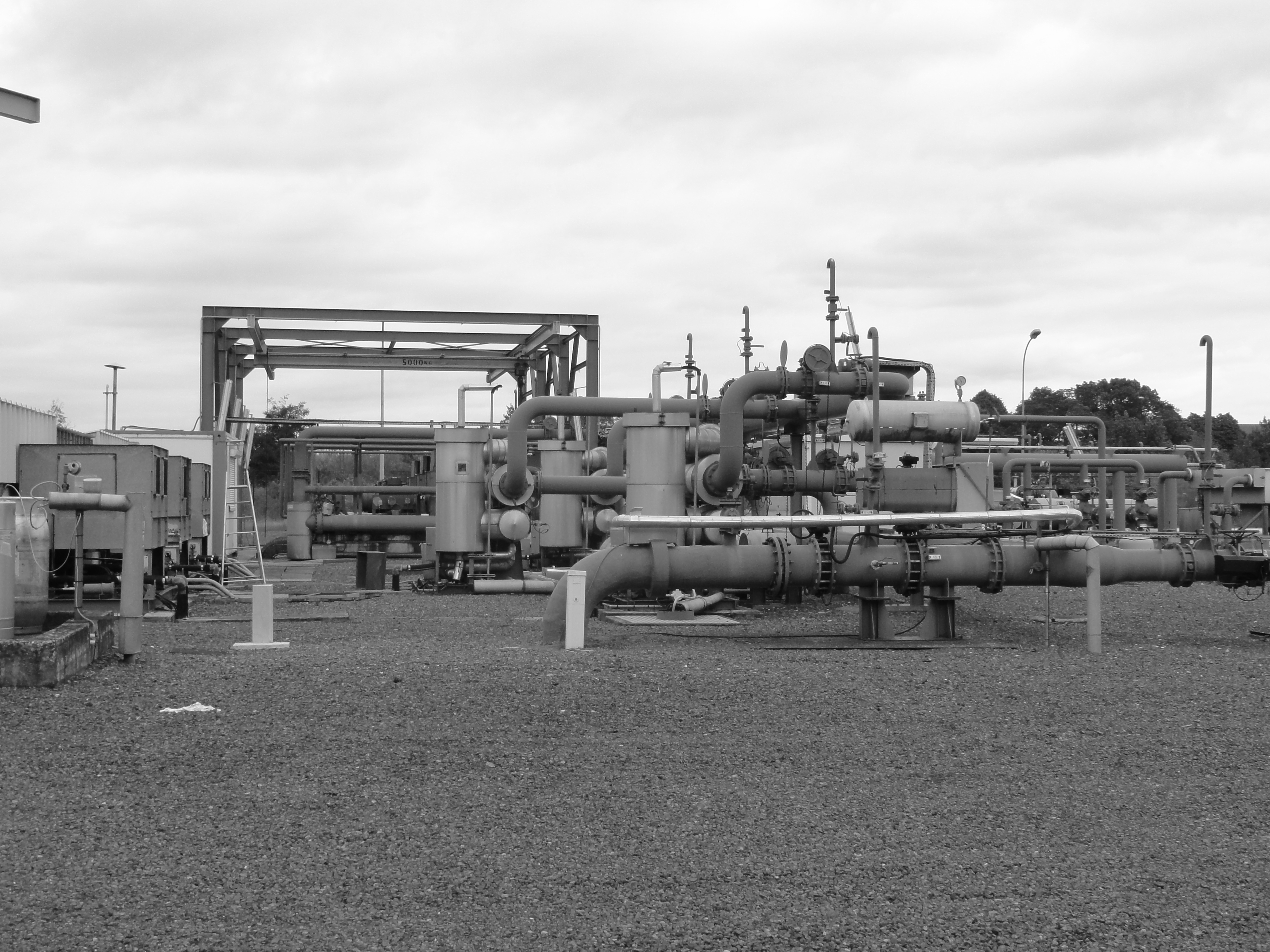 La Fosse n° 5 - 5 bis de la Compagnie des mines de Lens était un charbonnage constitué de deux puits situé à Avion, Pas-de-Calais, Nord-Pas-de-Calais, France.